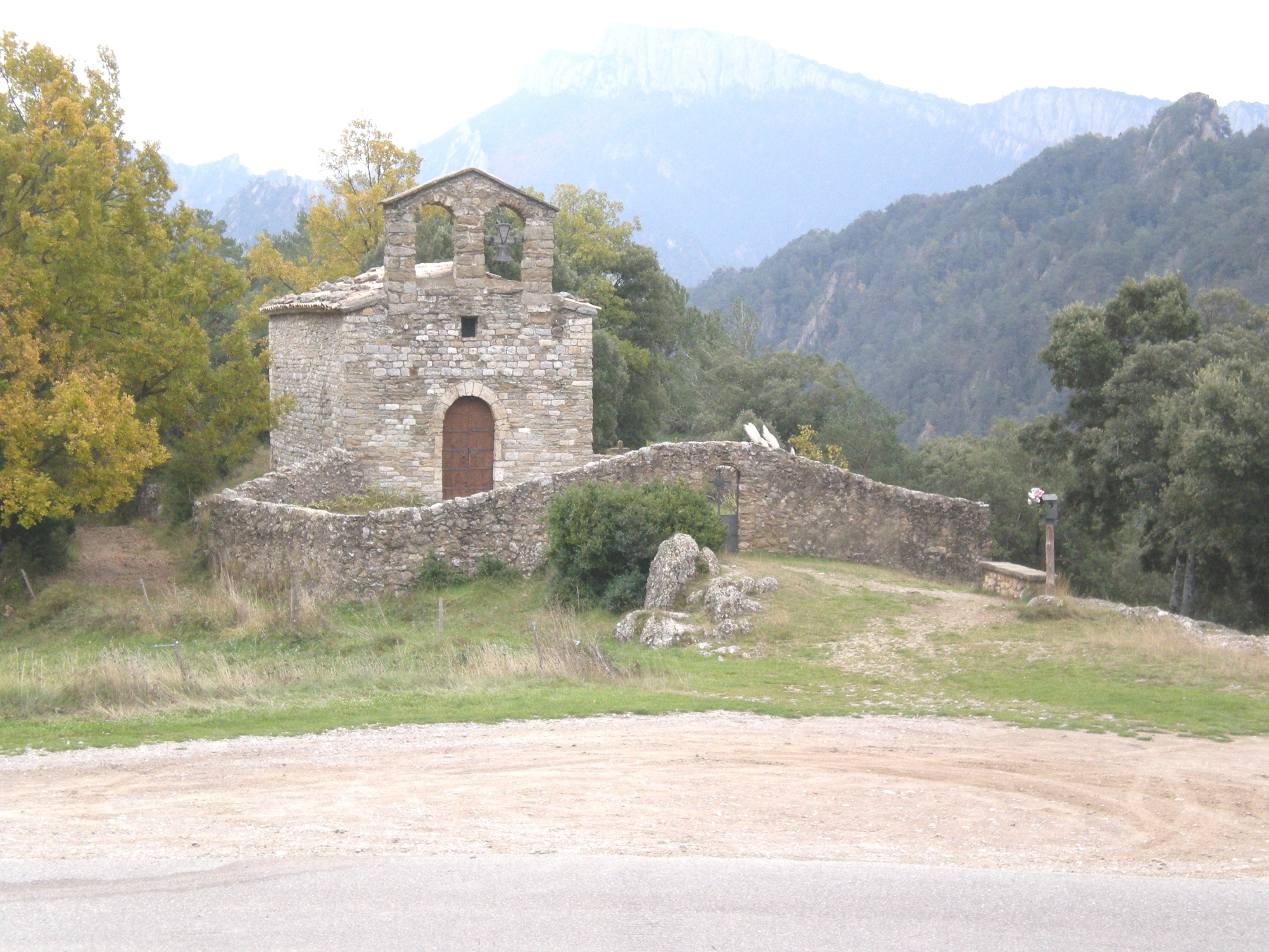 L'església de Sant Serni del Grau, a Vilamantells (Guixers, Solsonès). A la dreta de la imatge, les Roques de Lord. Al fons, la serra de Busa.